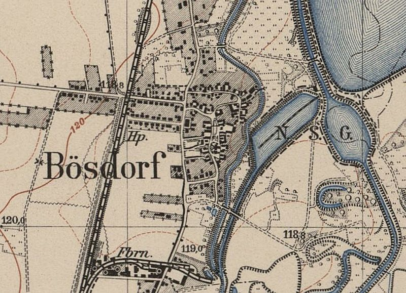 Bösdorf auf einem Messtischbaltt von 1940. Rechts oben der Elsterstausee Bösdorf.